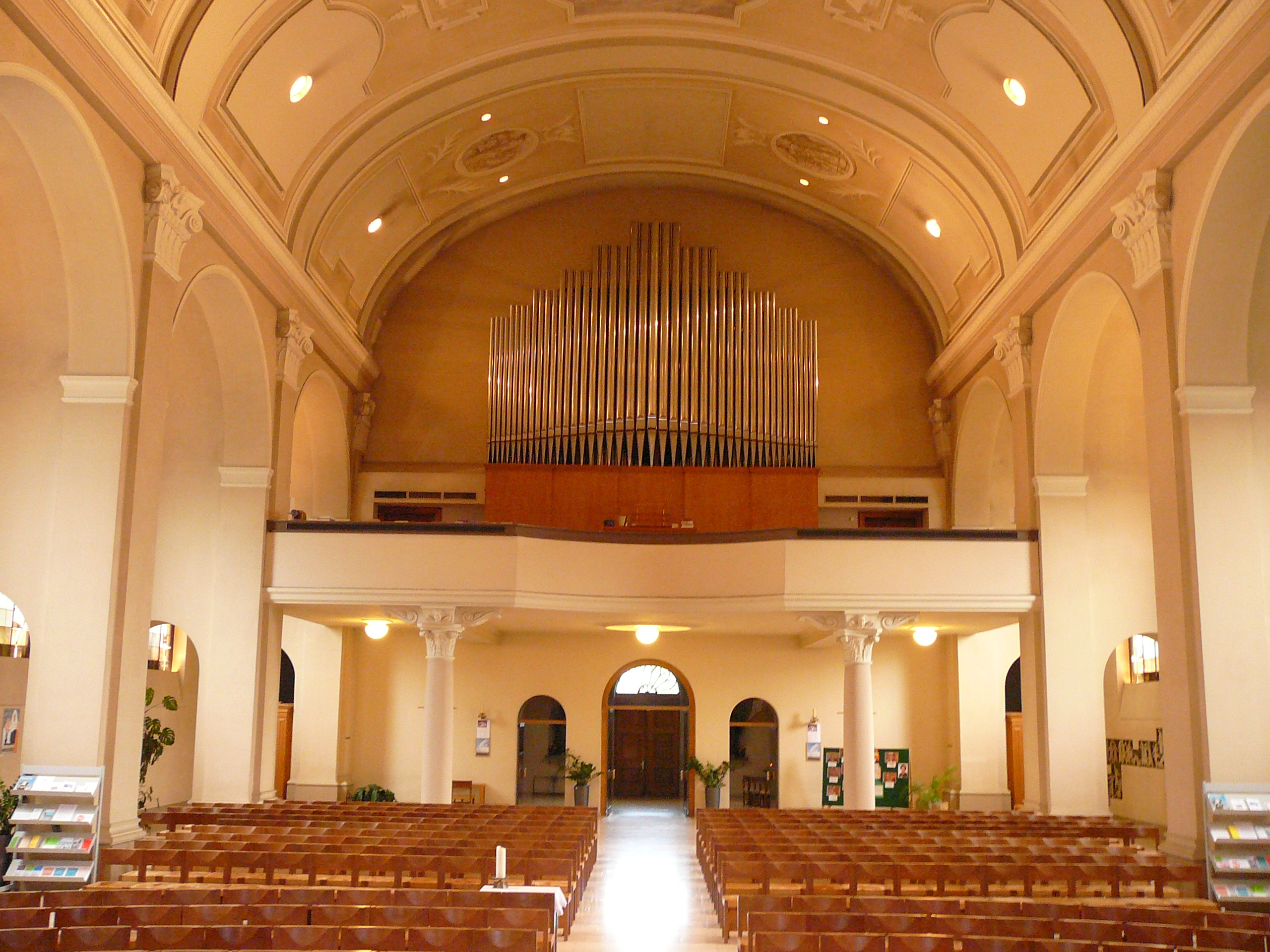 Römisch-katholische Pfarrkirche Guthirt, Zürich, Blick zur Orgelempore